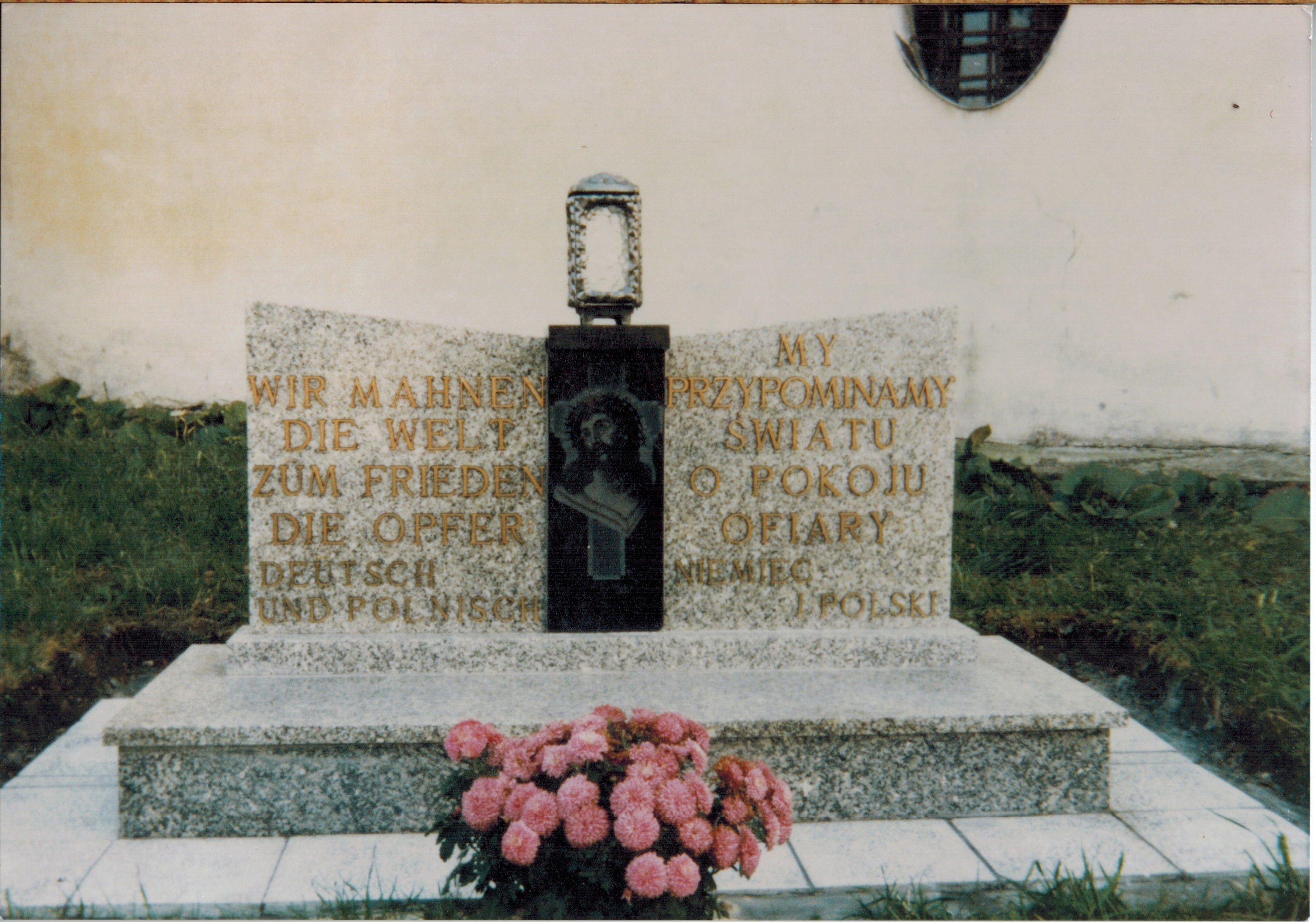 Gedenkstein auf dem Friedhof Lipowa (Nysa) dt. Lindewiese Kreis Neisse an die Opfer des Krieges